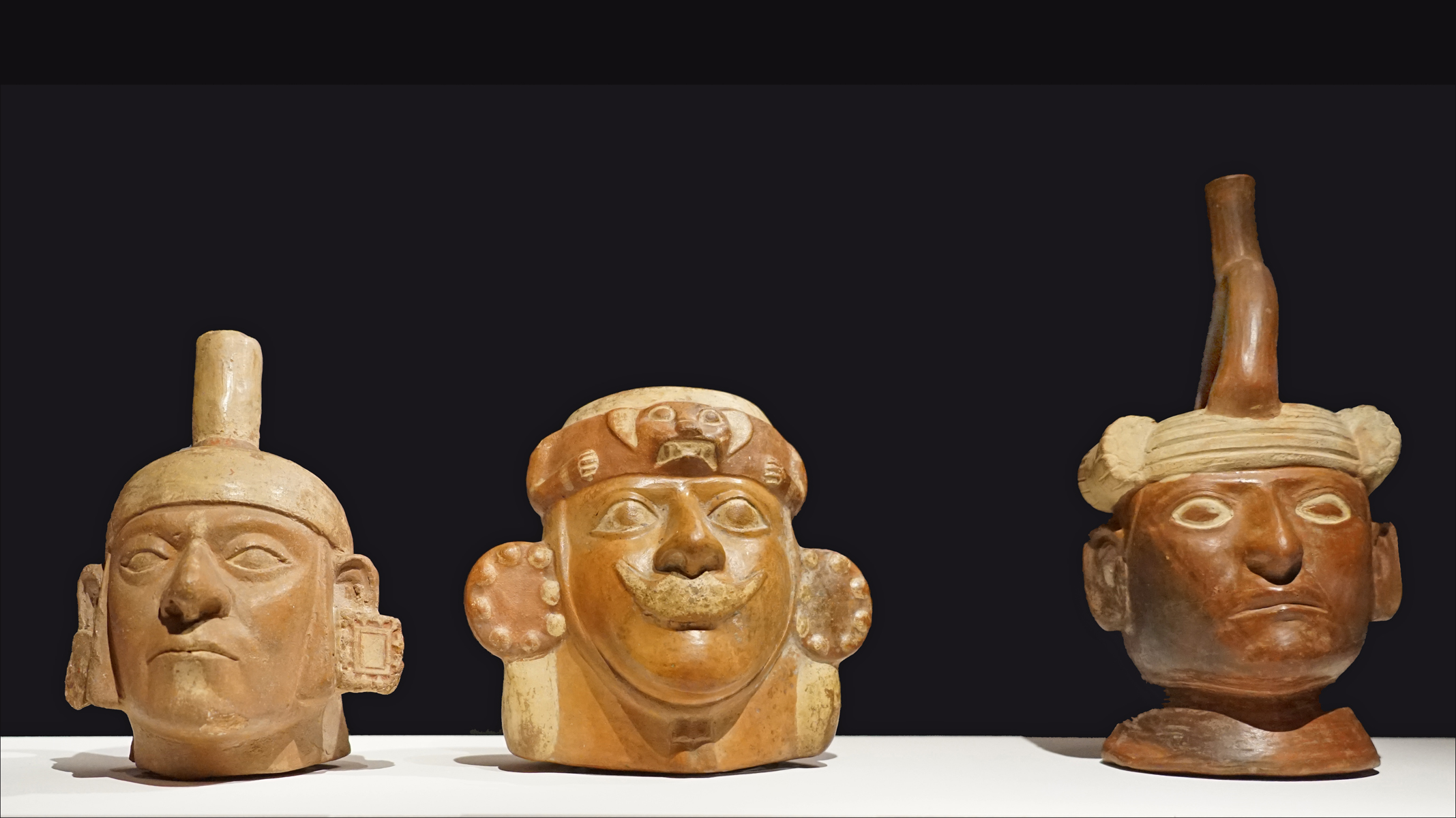 Au centre, un vase Huaco avec turban enroulé autour de la tête. À gauche et à droite, deux bouteilles Huaco à anse-goulot en étrier Période Moche III Pérou, Amérique du sud 300-400 ap. J.-C. Céramique modelée et peinte Musée du quai Branly - Jacques Chirac, Paris Objets présentés dans l'exposition "Le Pérou avant les Incas" au musée du quai Branly - Jacques Chirac, à Paris